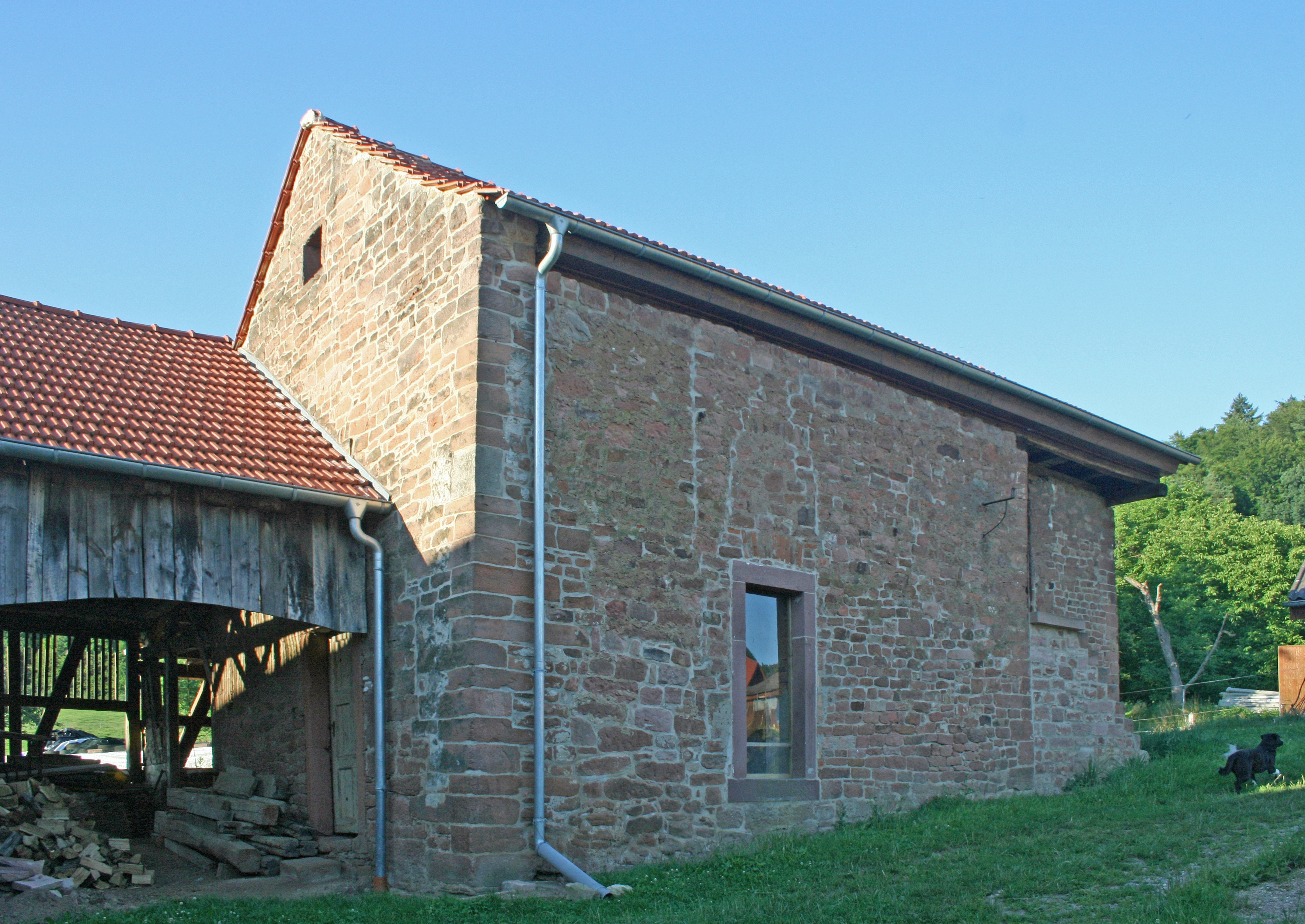 Arnheider Kapelle bei Breuberg - Rai-Breitenbach, Ansicht von SW.